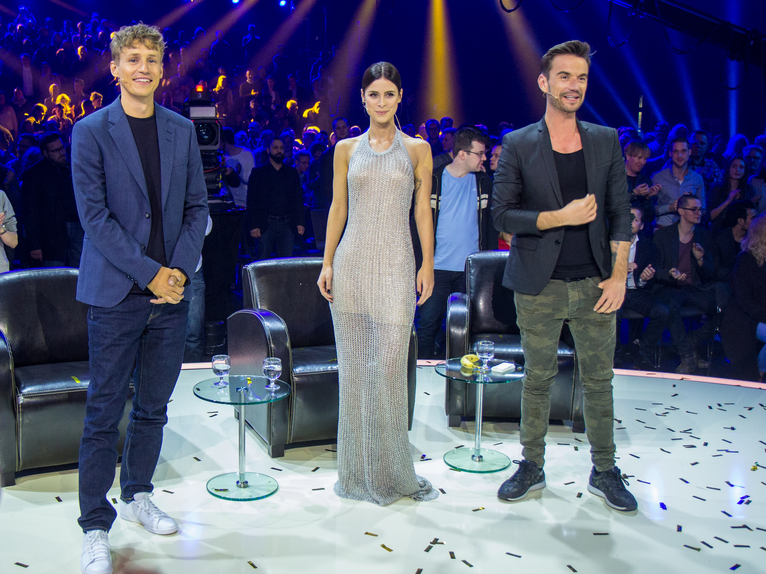 Unser Song 2017 - Liveshow - die Jury: Tim Bendzko, Lena Meyer-Landrut und Florian Silbereisen